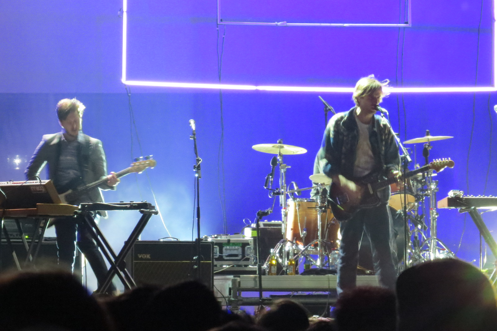 Cut Copy en el Festival Primavera Fauna 2013. Santiago de Chile.